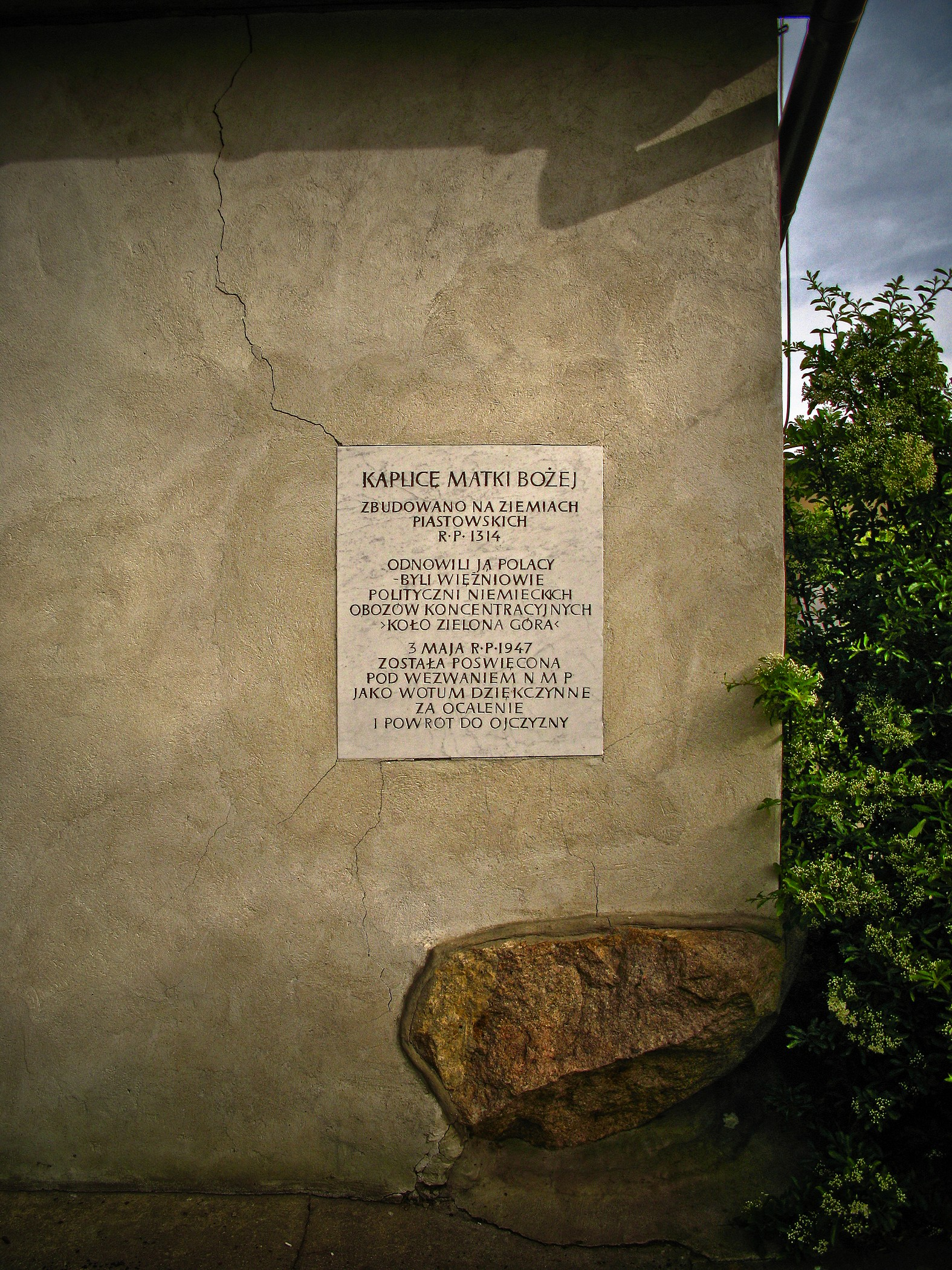 Kapliczka na Winnicy w Zielonej Górze, tablica informacyjna.